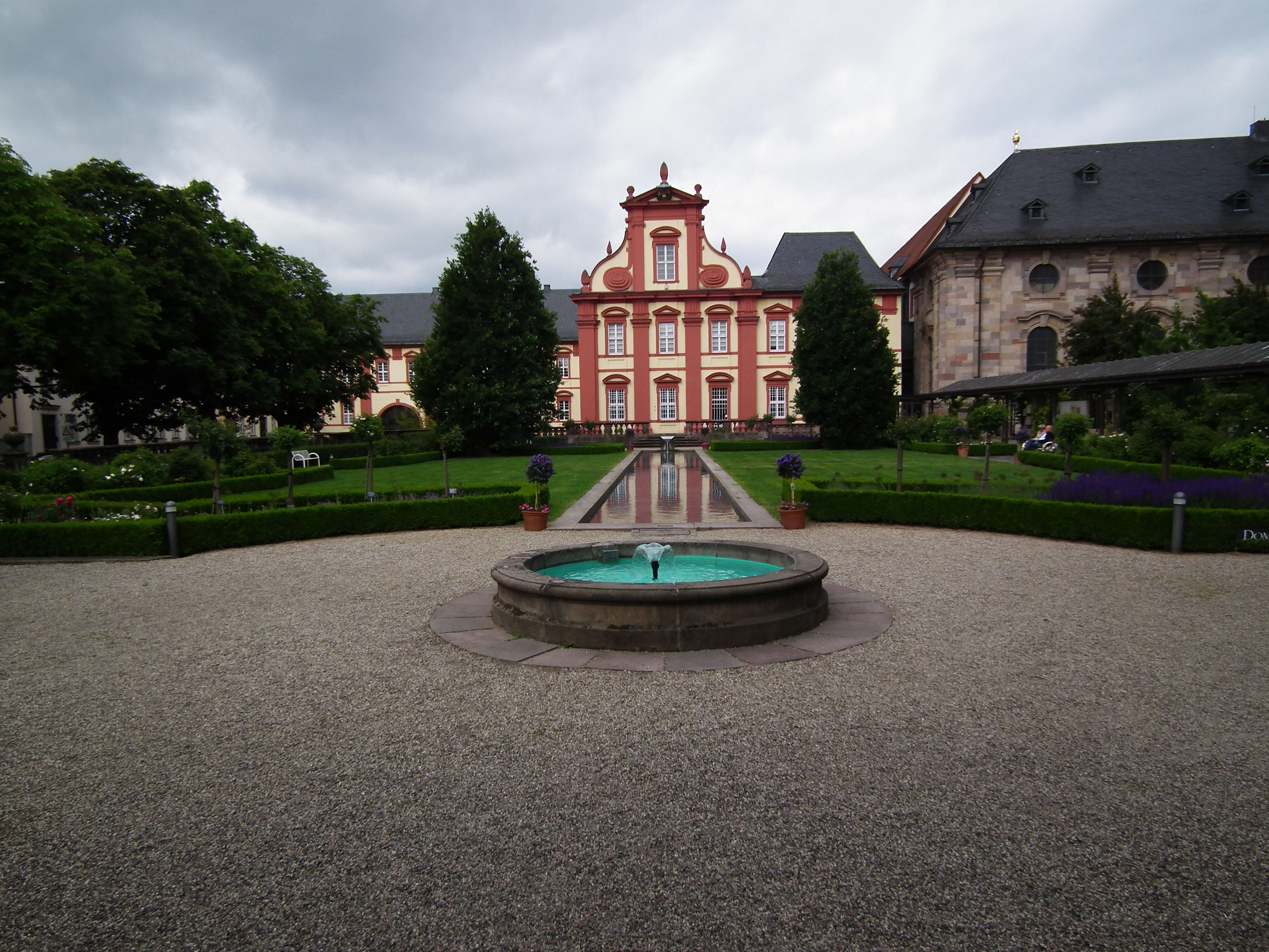 Domgarten in Fulda (Hessen, Deutschland)